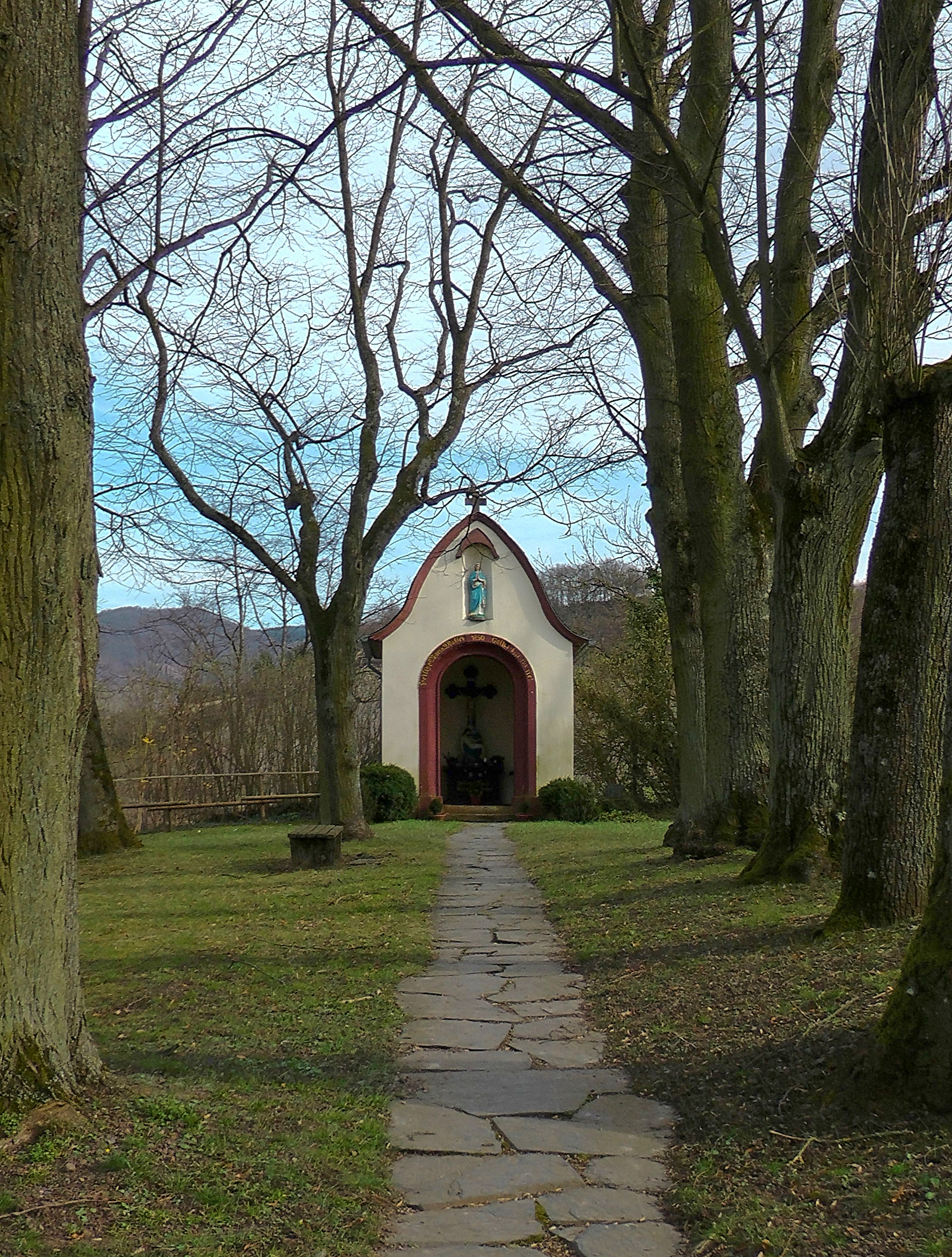 Kapelle und Naturdenkmäler am Lambrechtskirchhof in Ayl an der Saar.